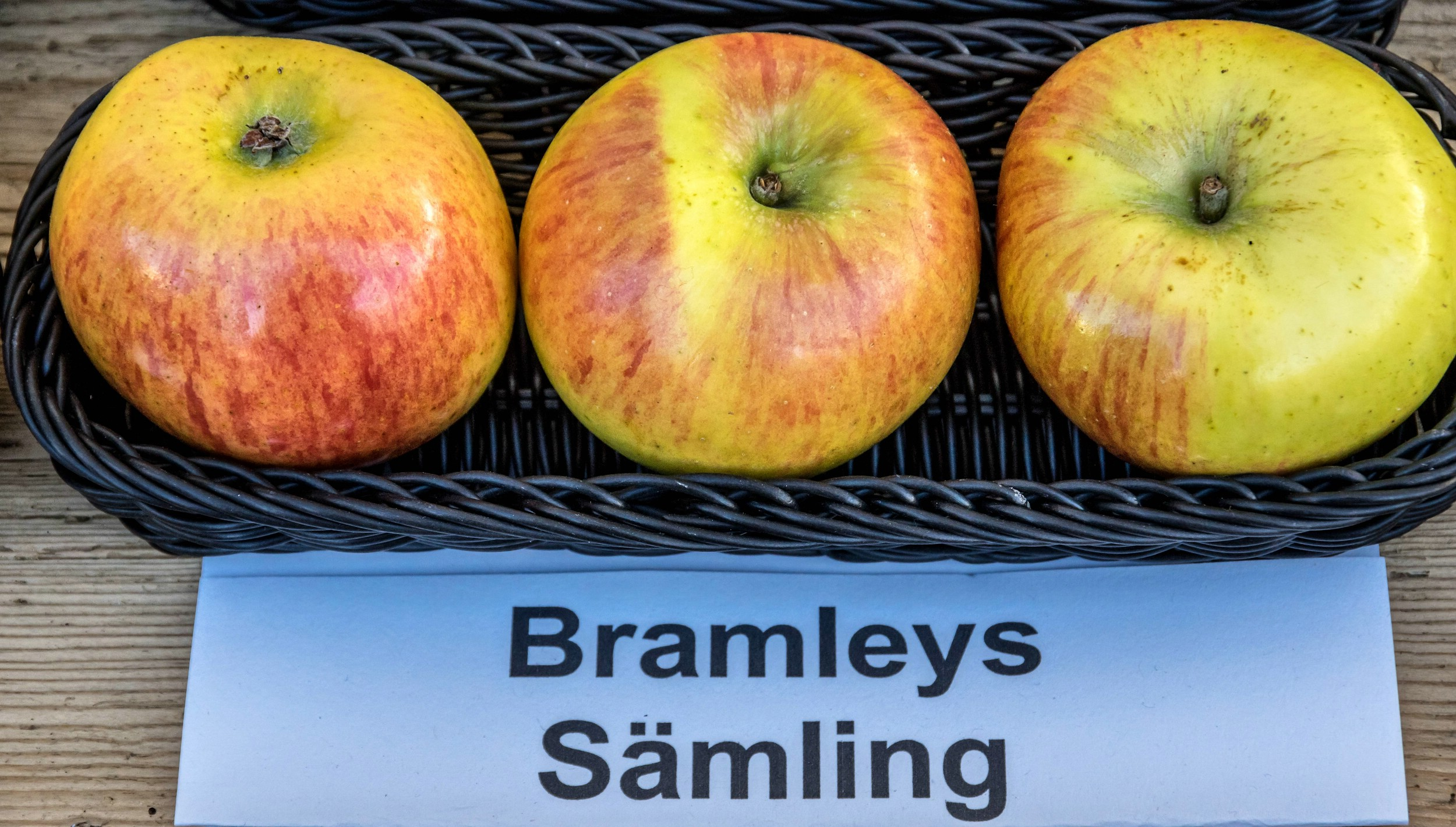 Alte Apfelsorten, von denen es im Badischen noch tragende Bäume gibt. Alle Aufnahmen au dem Oktober 2015